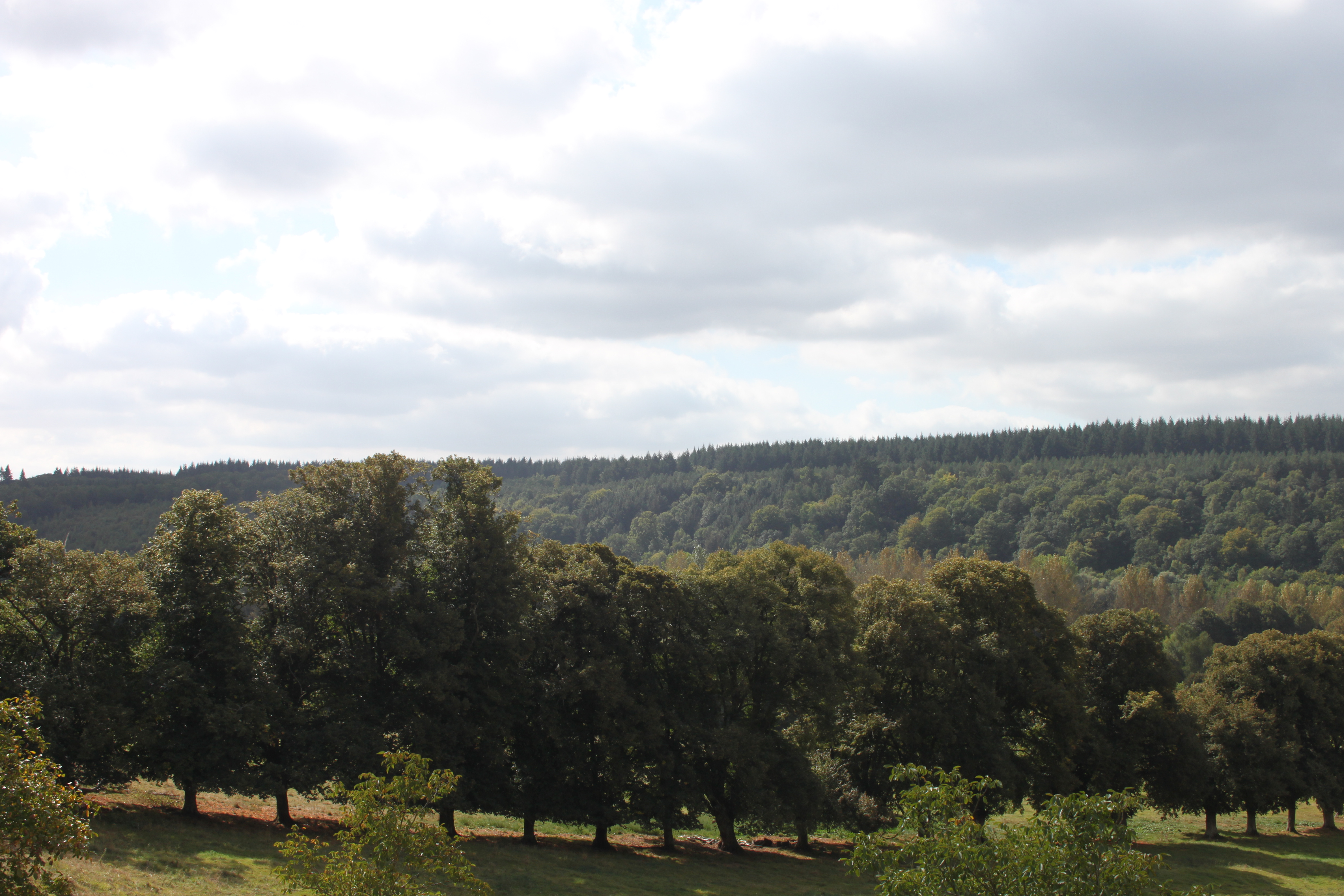 La vallée du Bec, site naturel inscrit (1976).